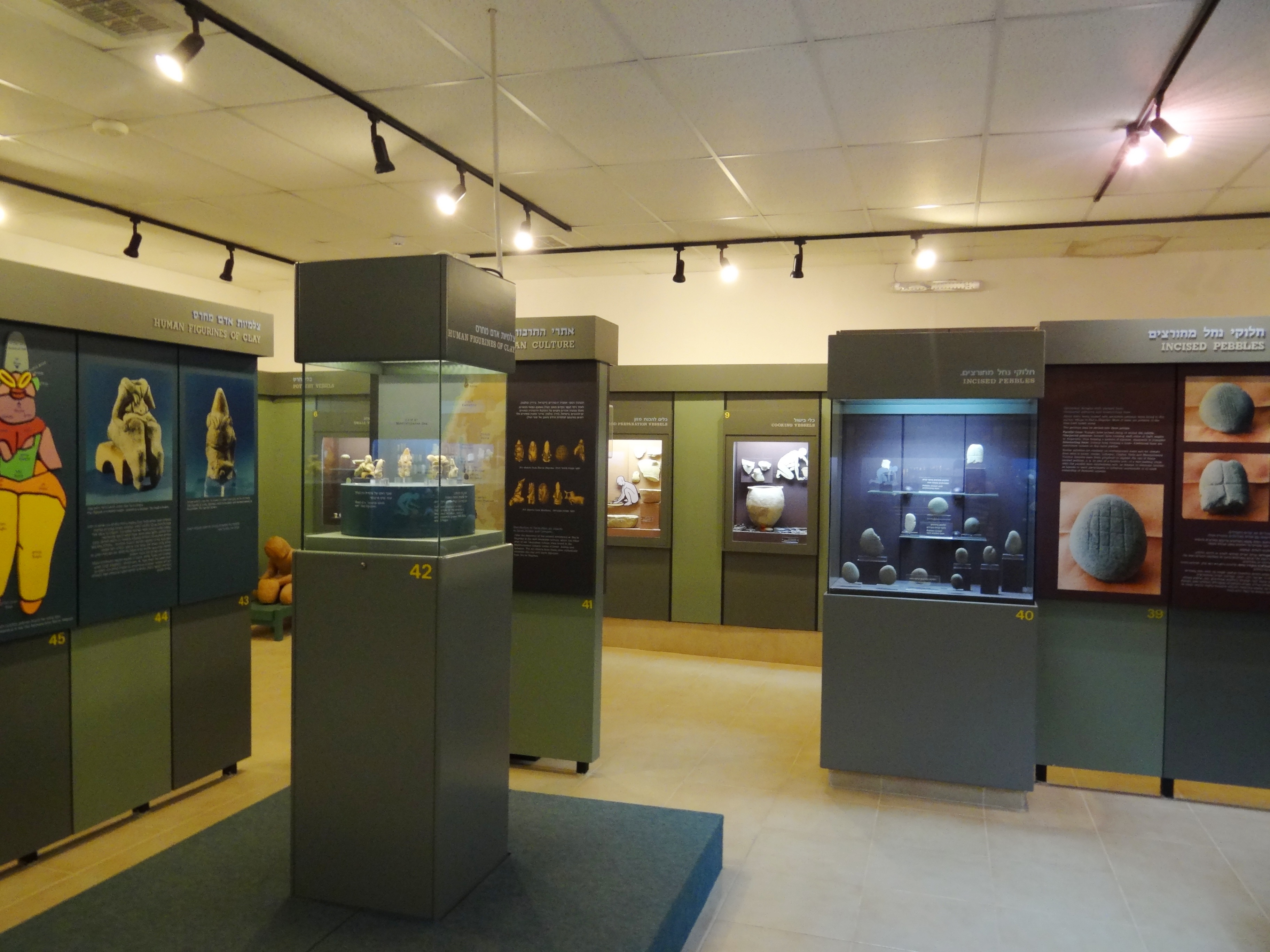 Yarmukian Culture Museum in kibbutz Shaar Hagolan, Israel המוזיאון לתרבות הירמוכית ע"ש יהודה רות השוכן בקיבוץ שער הגולן בעמק הירדן